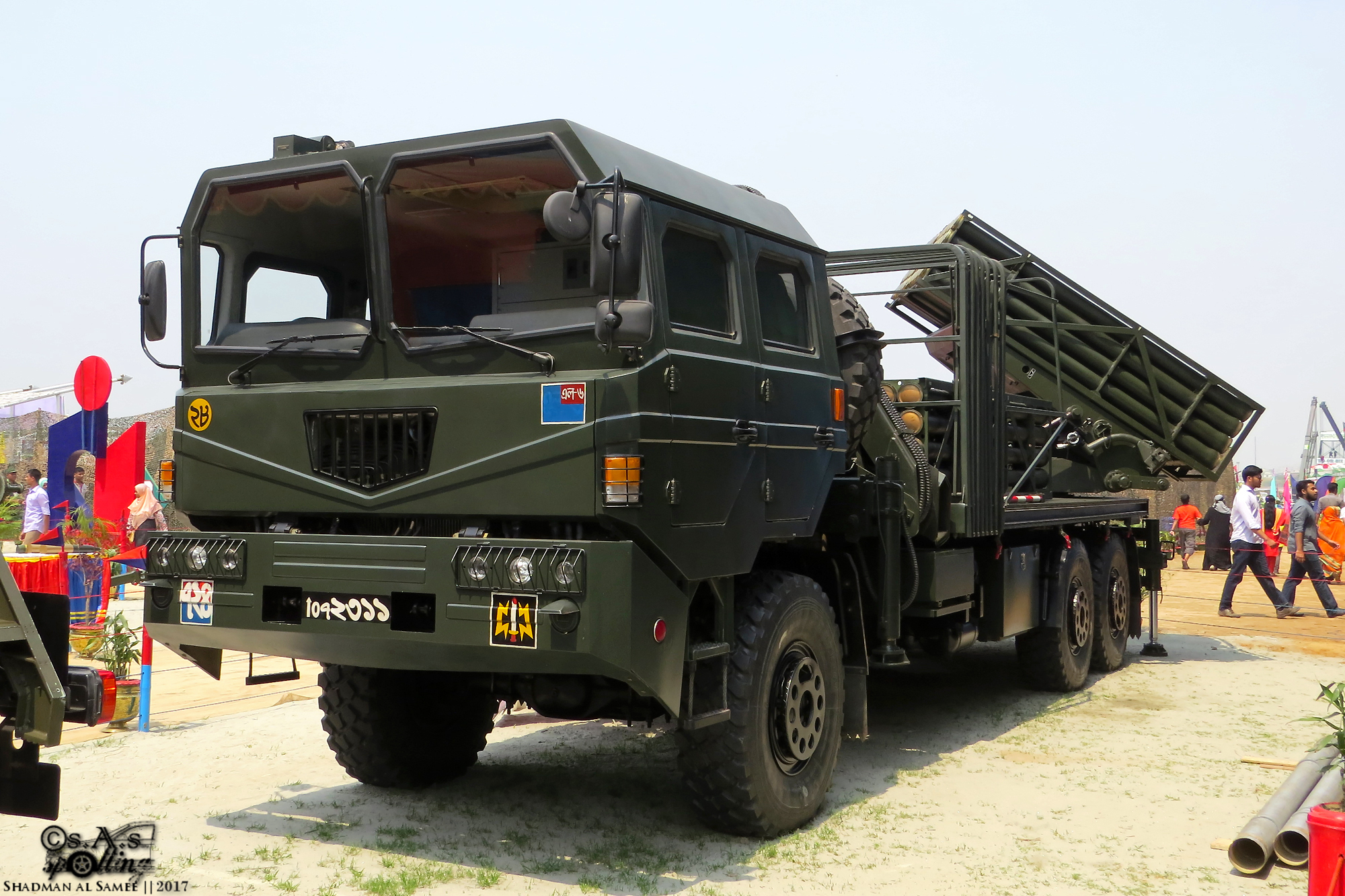 VGTJ/ MHD 2017.